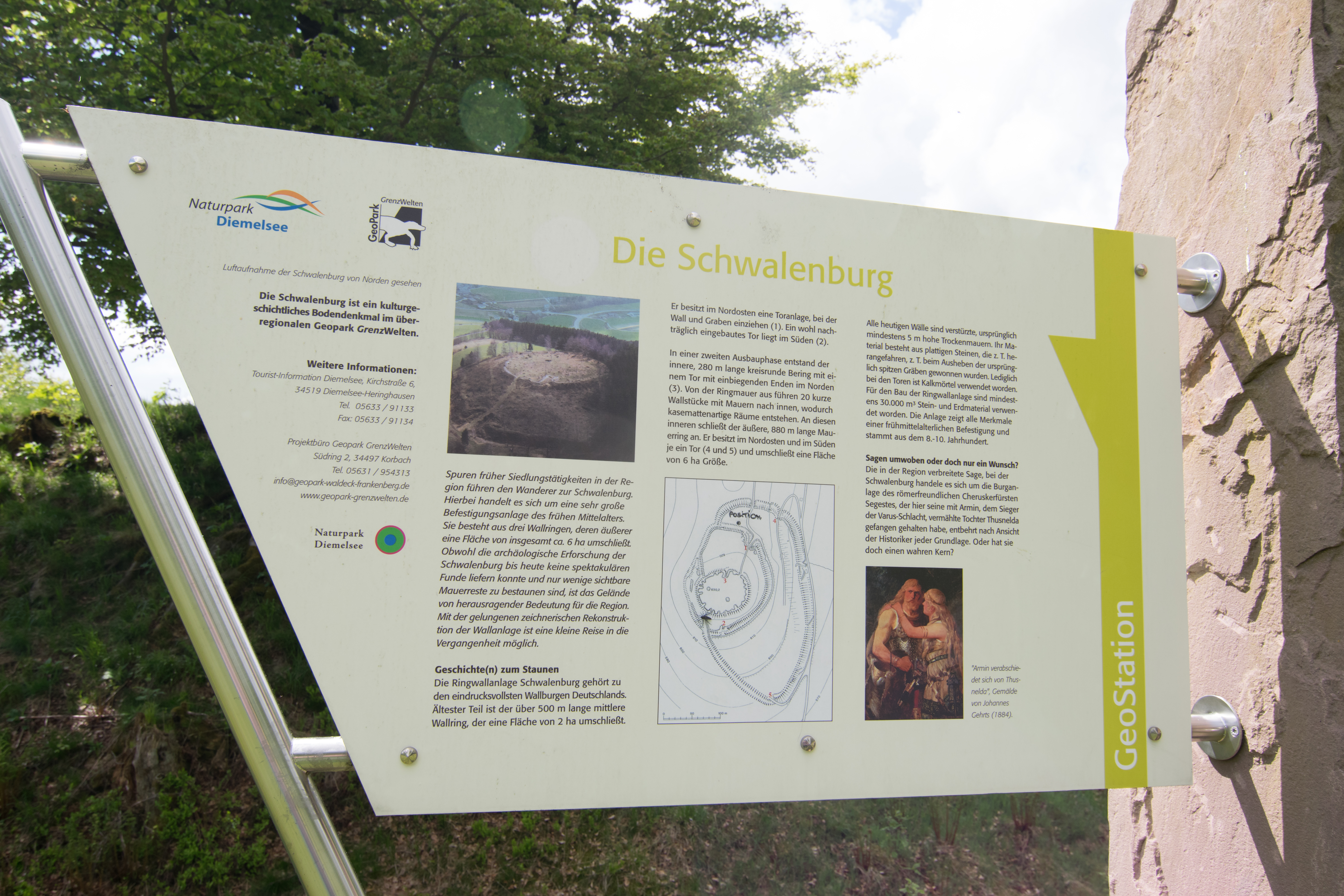 Schwalenburg Infotafel